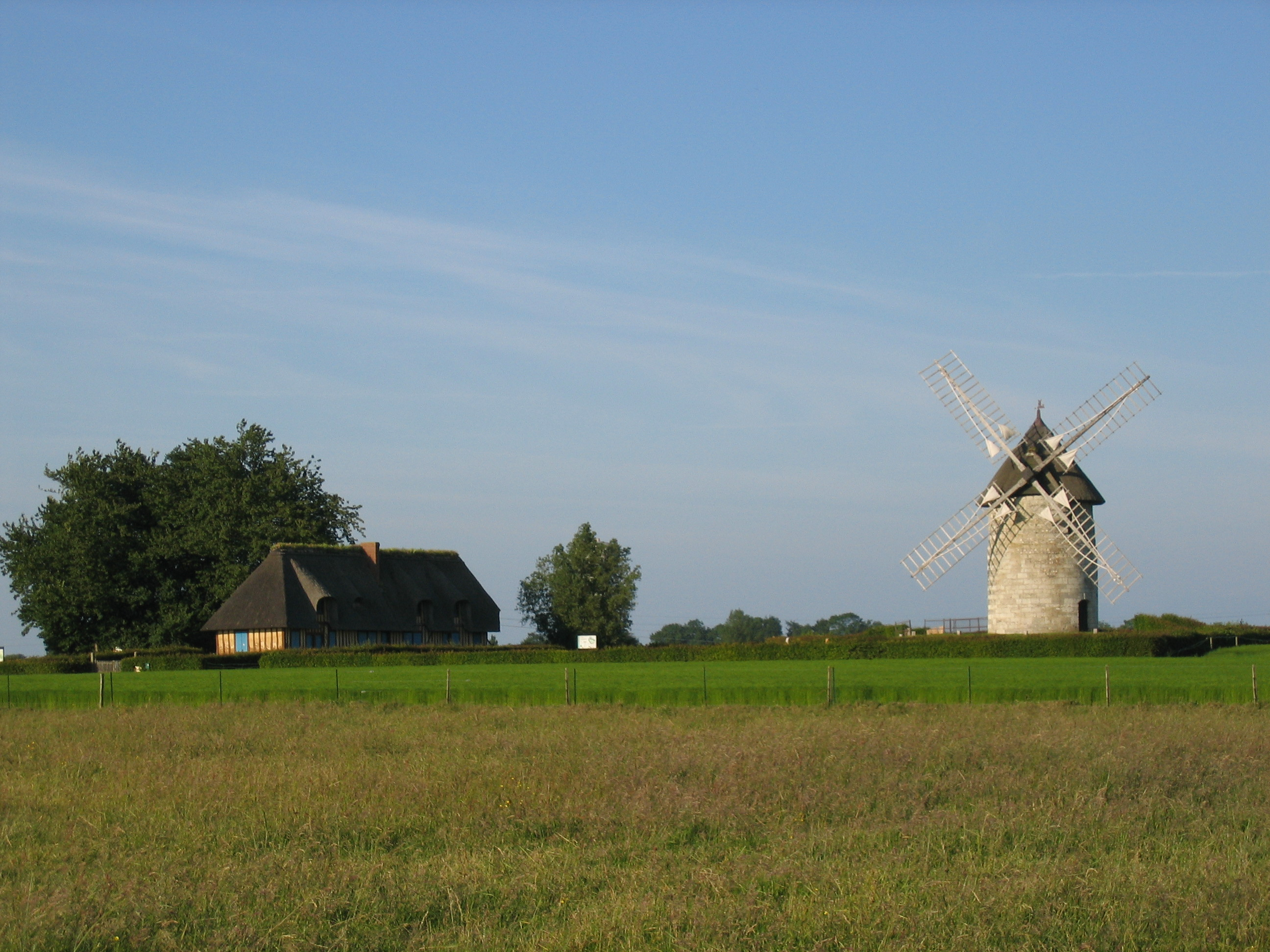 Photo du moulin d'Hauville (27), prise en juin 2005. Sawyer